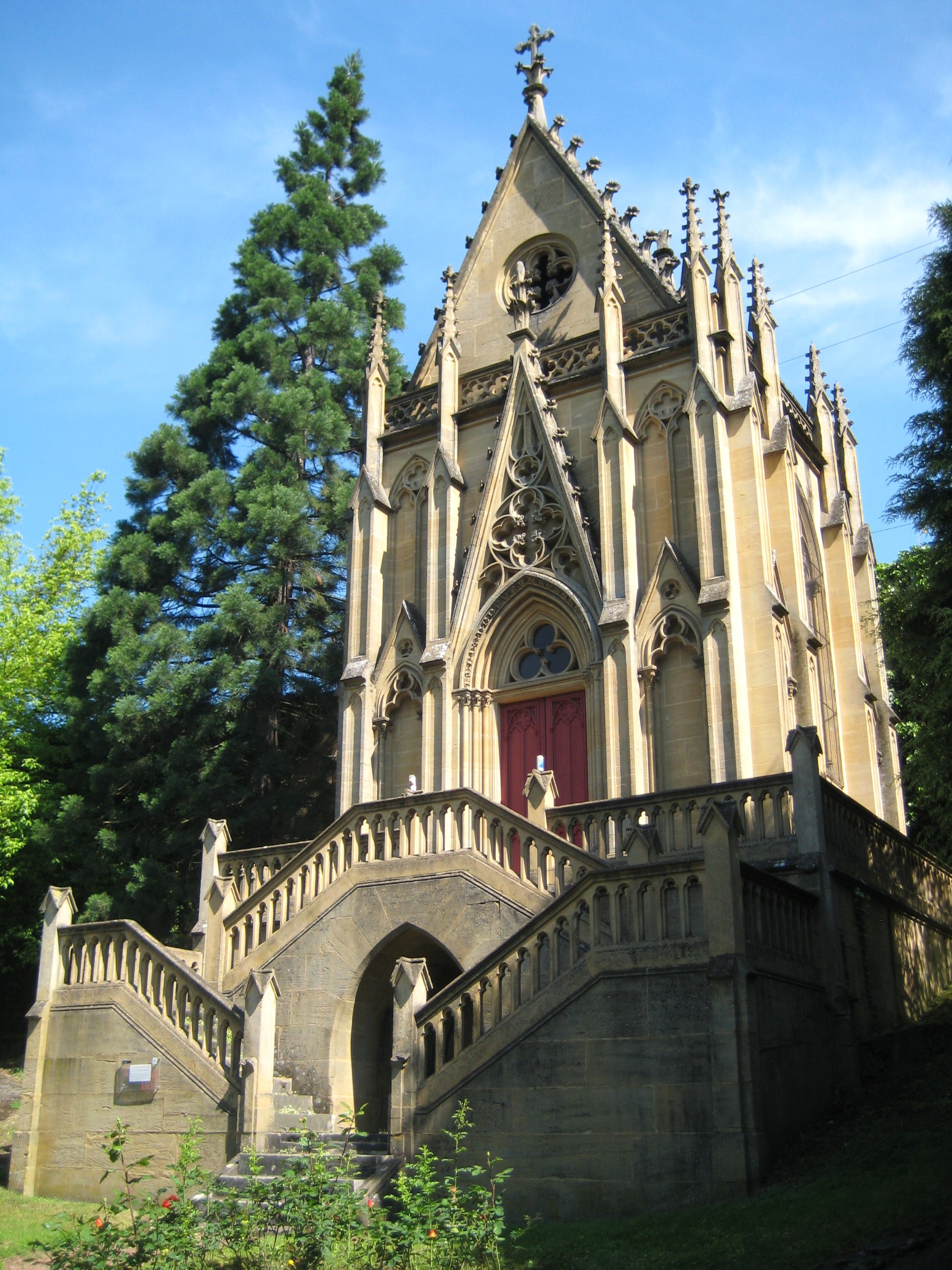 Description La chapelle sépulcrale de la famille de Wendel, Hayange (voyez ici) Date24 May 2009Sourcemon appareil photoAuthorAimelaime La chapelle sépulcrale de la famille de Wendel, Hayange (voyez ici)